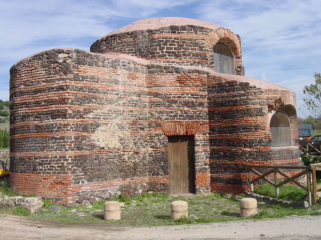 La chiesa bizantina di Mesumundu, Siligo (SS9 - Italia. Veduta dell'ingresso